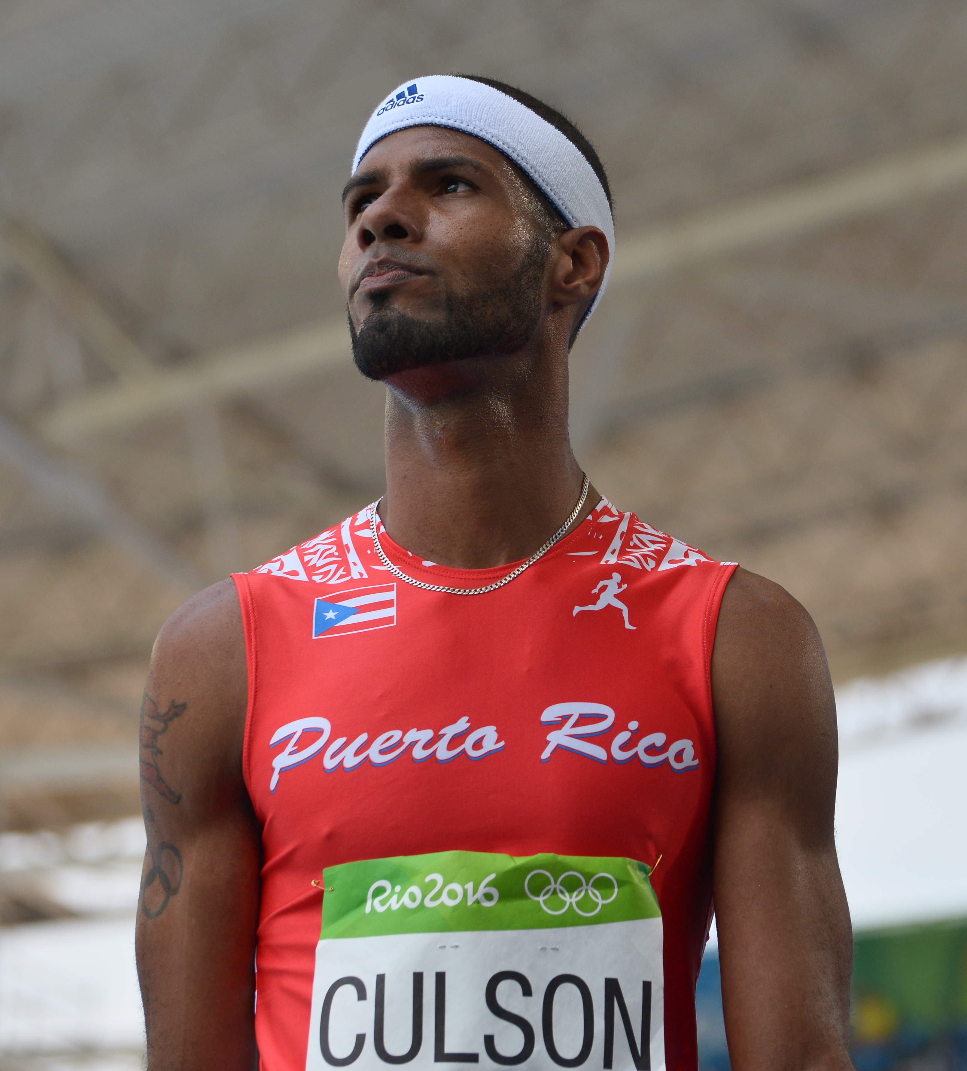 Quelques séries du 400m haies des jo de Rio 2016